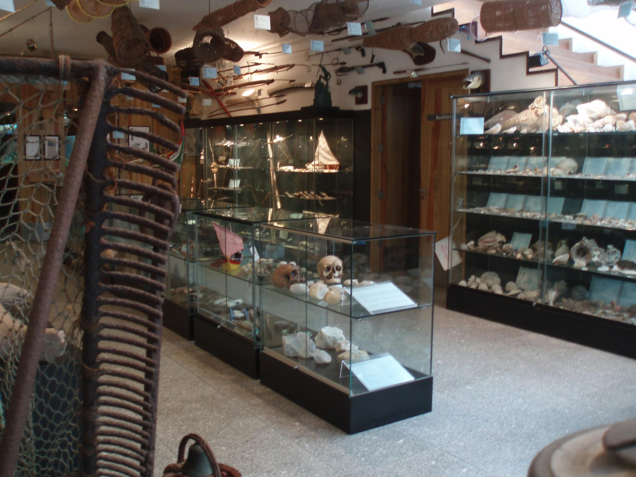 Fotografia do Museu das Pescas